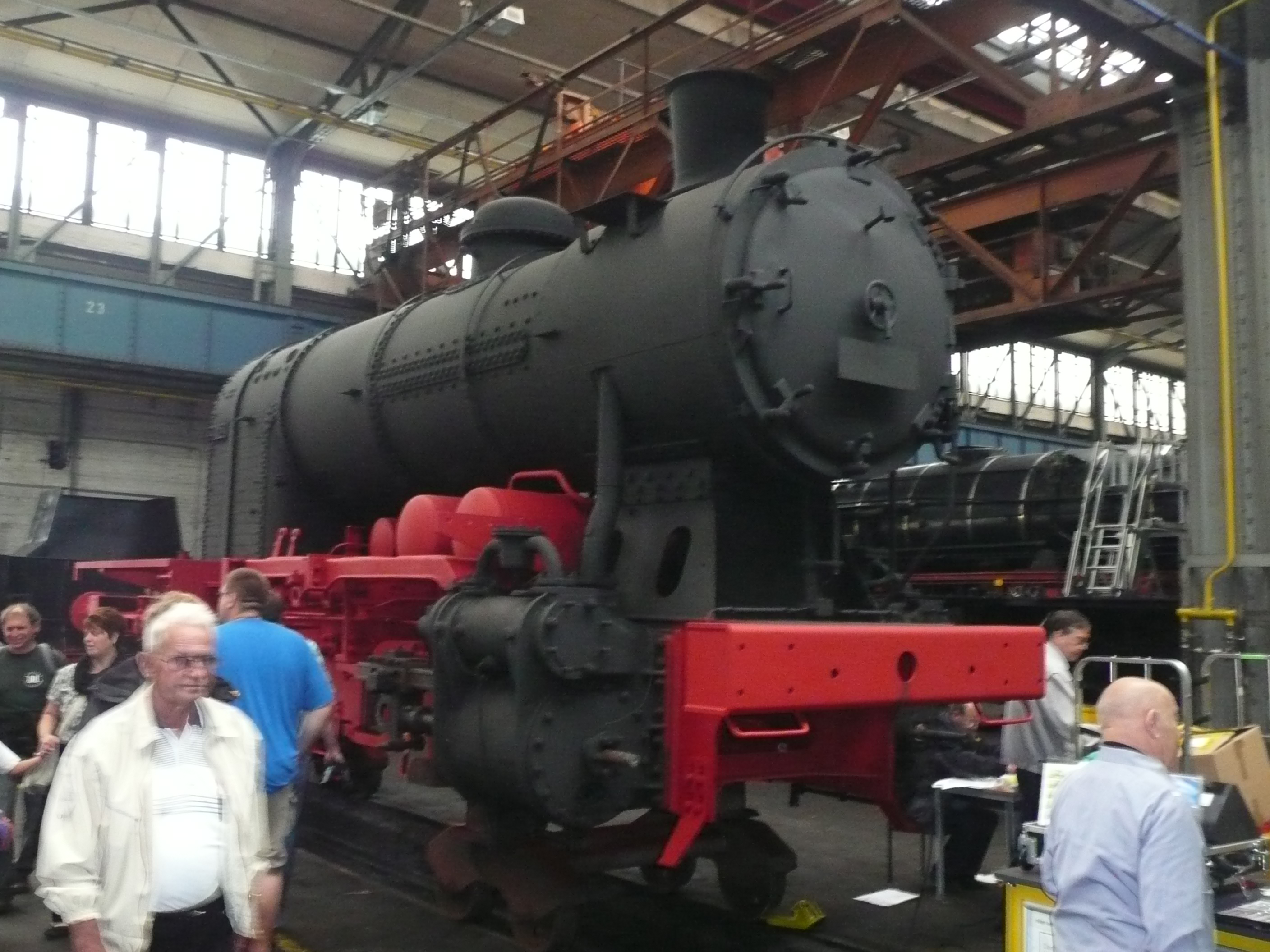 Saargruben AG, Kokerei Reden Nr. 36 (Krauss-Maffei Werknummer 17575) während der Aufarbeitung im Werk Meiningen. Die Lok trug eine Zeitlang bei der Historischen Eisenbahn Frankfurt/Main (HEF) die Fantasienummer 81 1001. Museal erhaltene Lokomotiven Krauss-Maffei